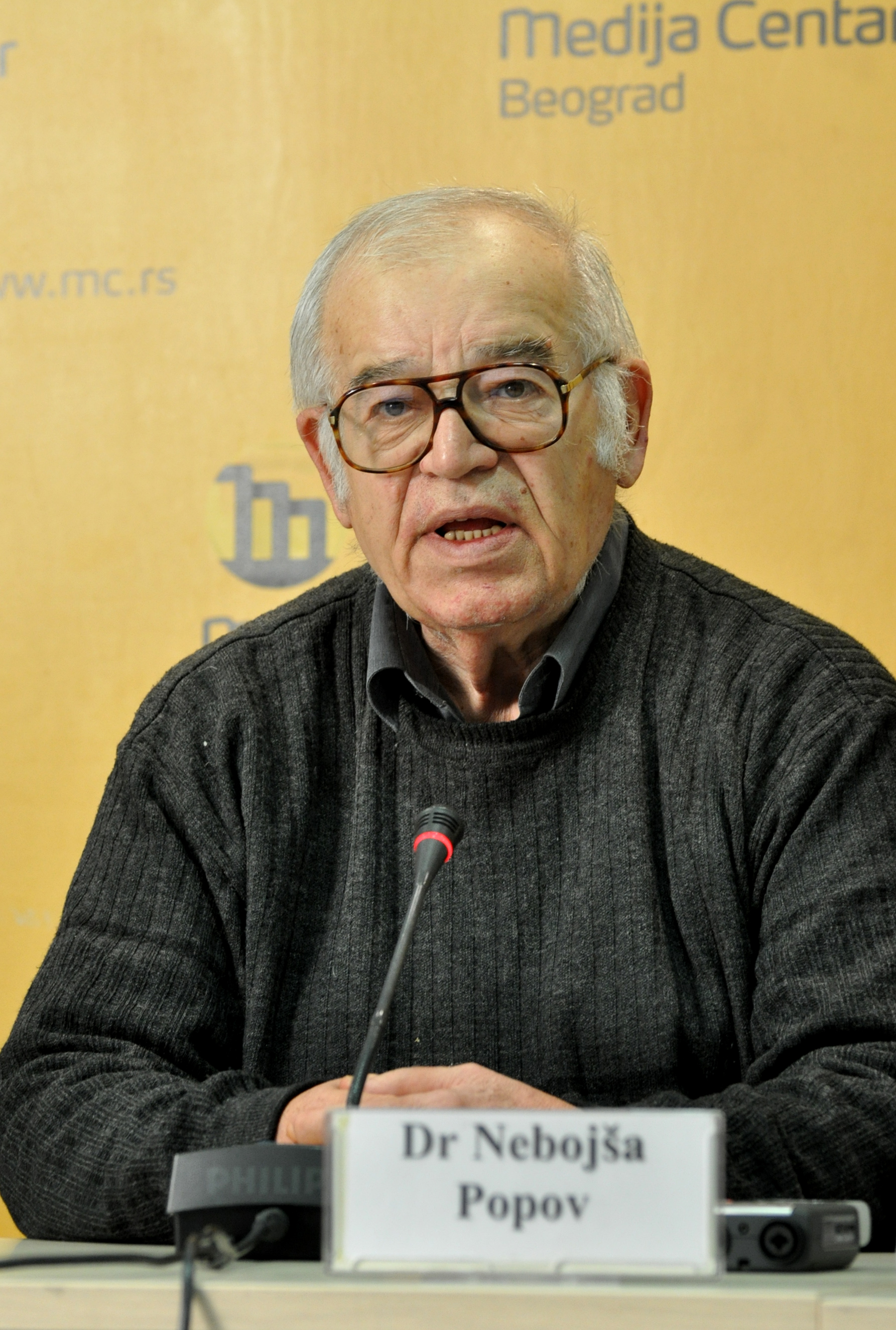 Nebojša Popov srpski sociolog